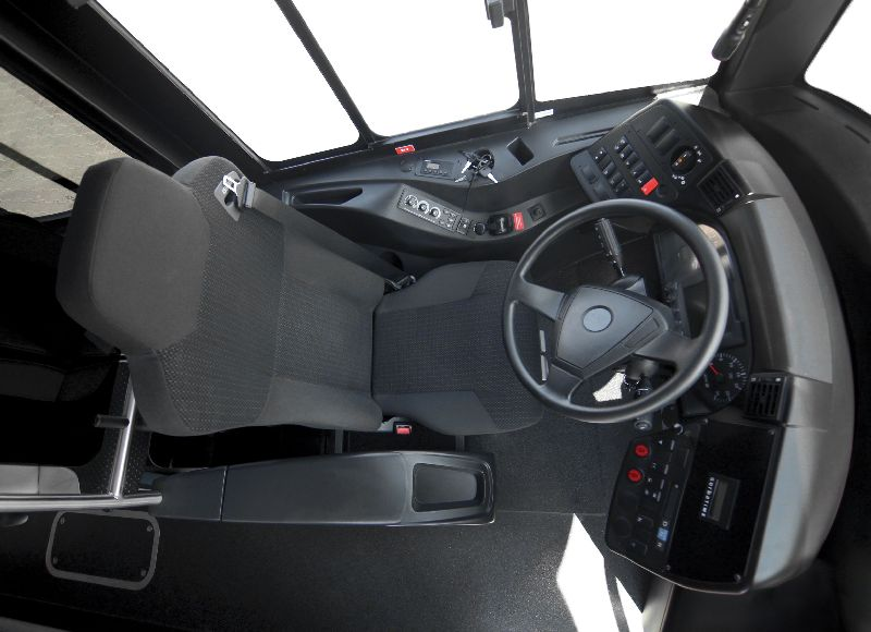 InterUrbino